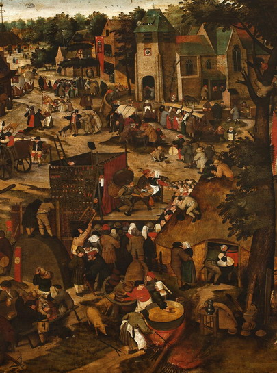 Копія втраченого твору батька виконана сином Пітером Брейгелем молодшим, котра мала популярність і відома за низкою копій і варіантів у різних збірках (варіант на дошці в Ермітажі)